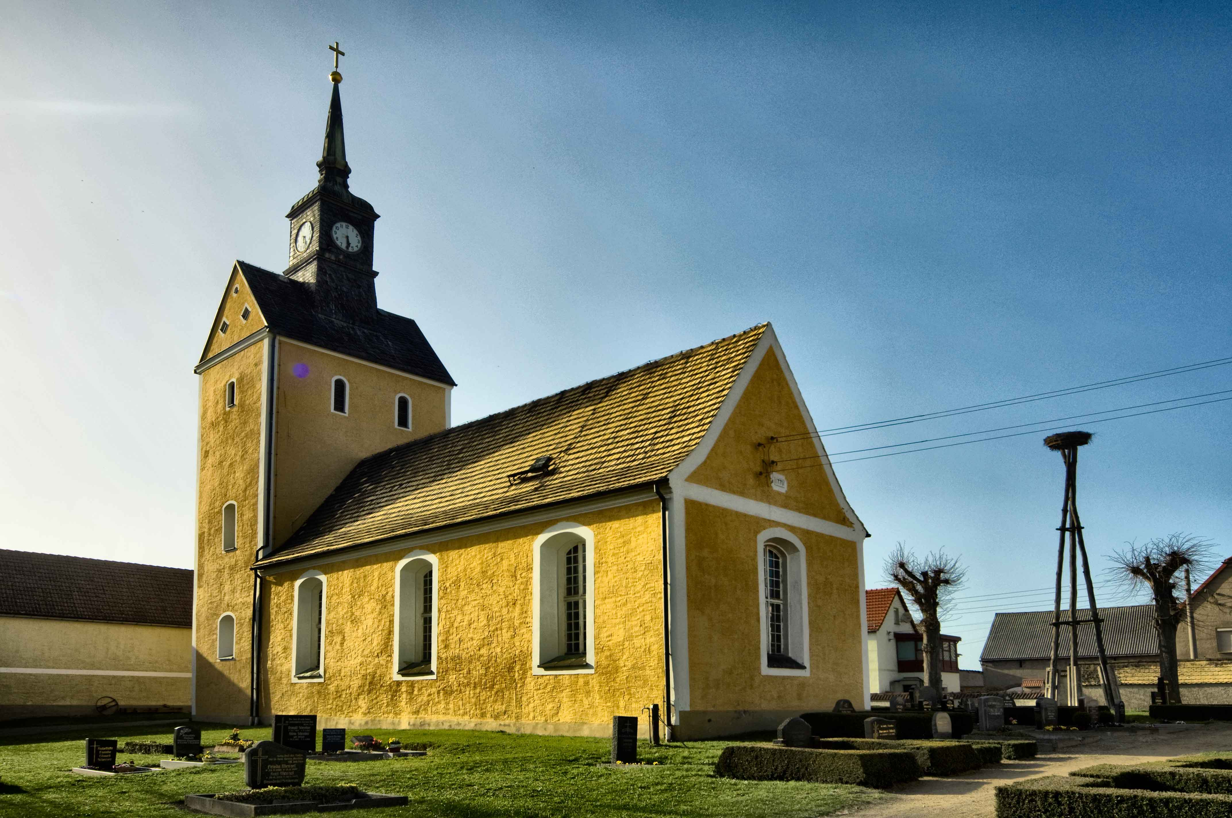 Evangelisch - lutherische Kirche in Malkwitz, Ortsteil von Wermsdorf in Sachsen, Stephan Komp